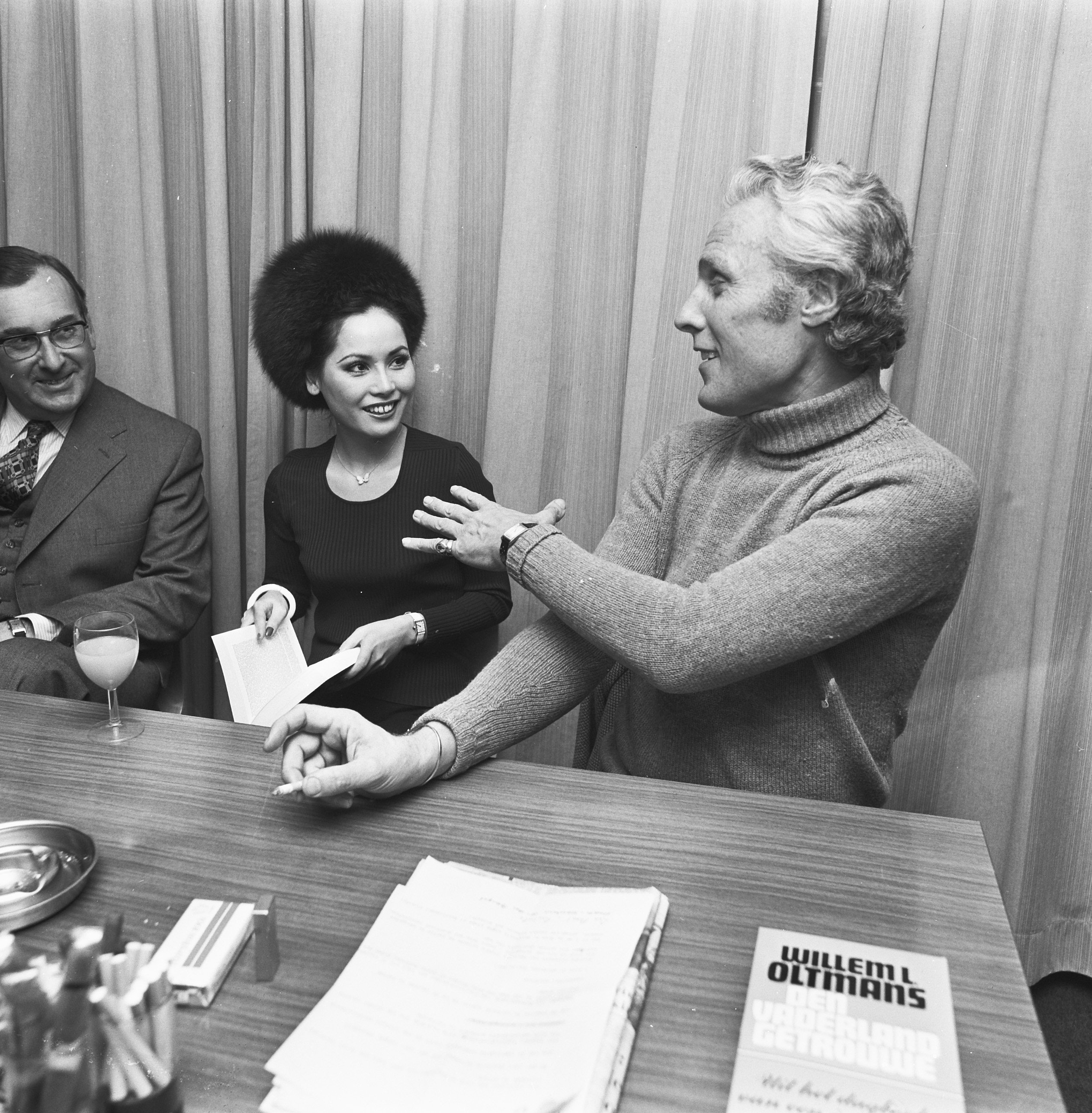 Collectie / Archief : Fotocollectie Anefo Reportage / Serie : Journalist Willem Oltmans presenteert in Nieuwspoort zijn boek "Den Vaderland Getrouwe" Beschrijving : Oltmans met Ratna Sara Dewi (weduwe van president Soekarno) Datum : 13 november 1973 Locatie : Den Haag, Zuid-Holland Trefwoorden : auteurs, boeken, weduwen Persoonsnaam : Oltmans, Willem, Soekarno, Ratna Dewi Fotograaf : Mieremet, Rob / Anefo Auteursrechthebbende : Nationaal Archief Materiaalsoort : Negatief (zwart/wit) Nummer archiefinventaris : bekijk toegang 2.24.01.03 Bestanddeelnummer : 926-8222